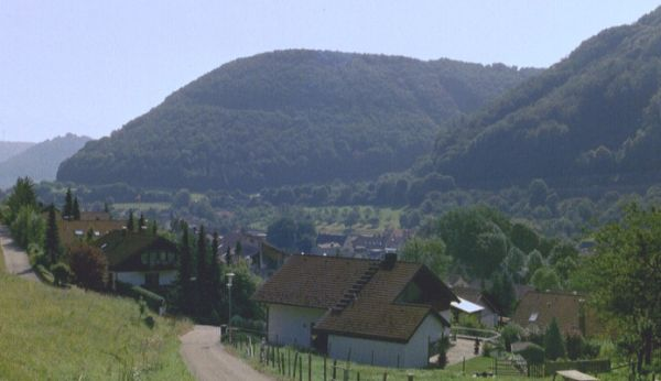 Mühlhausen im Täle